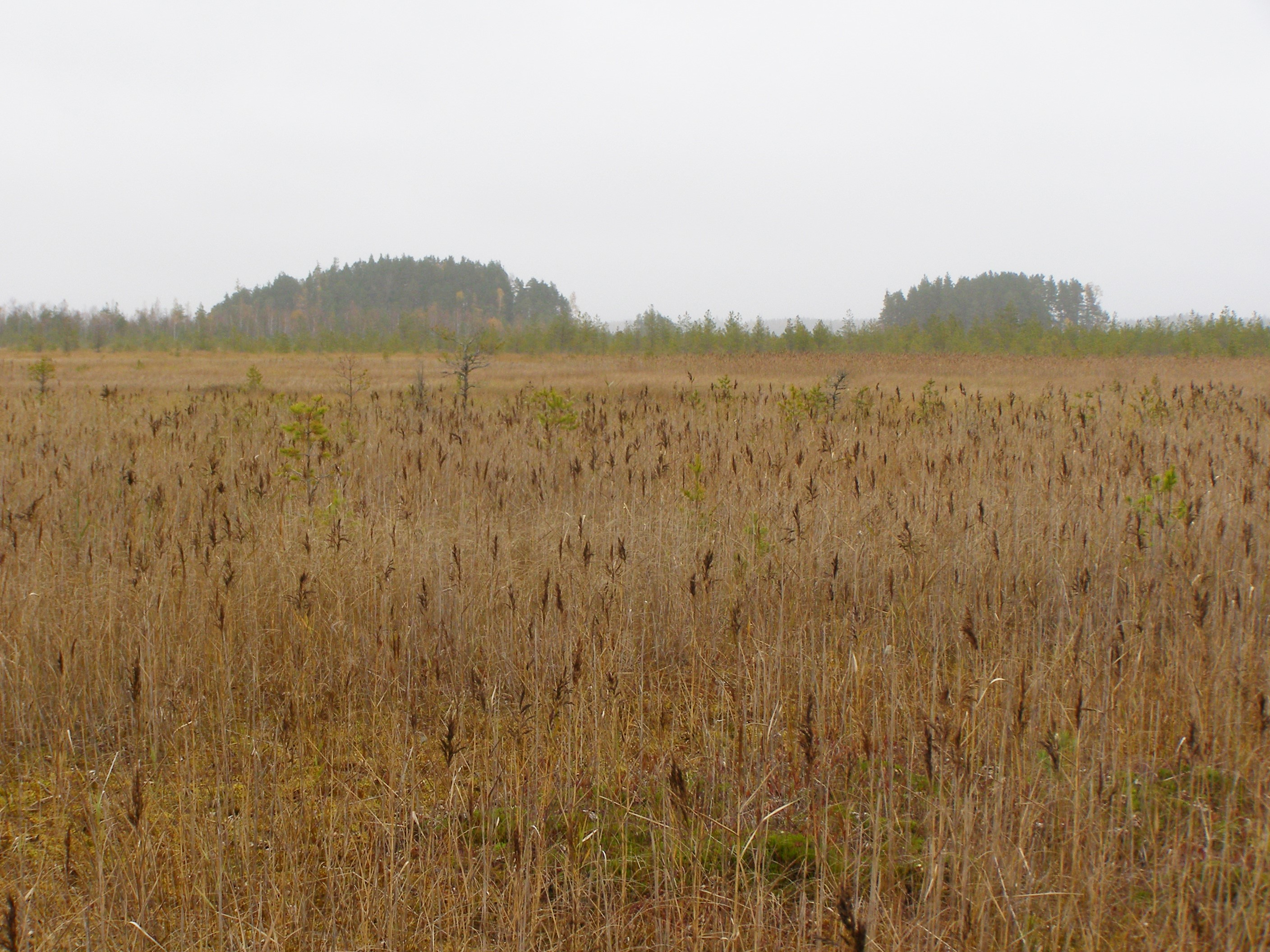 Muraka raba Rebaseuru künkad